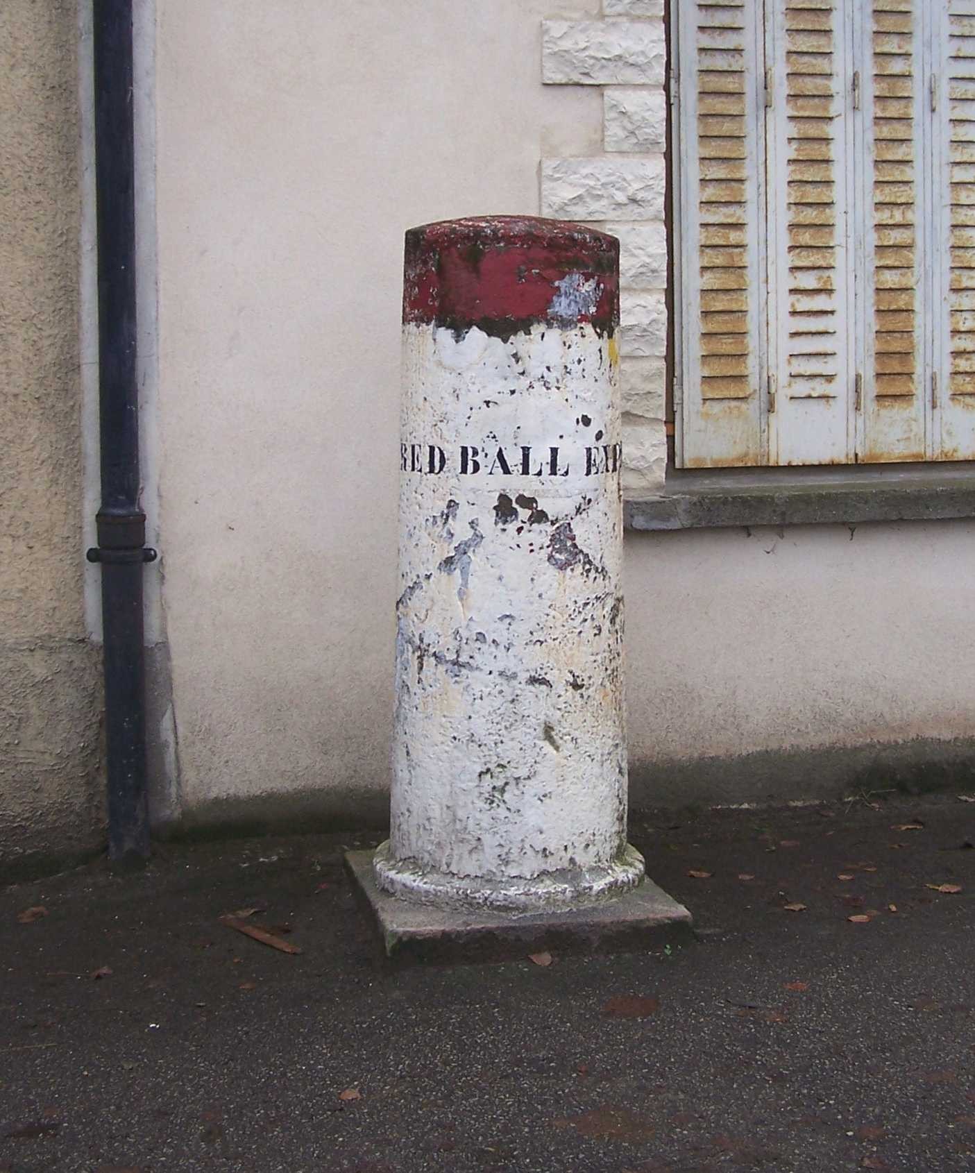 Borne commémorative du Red Ball Express à La Queue-lez-Yvelines (Yvelines, France)